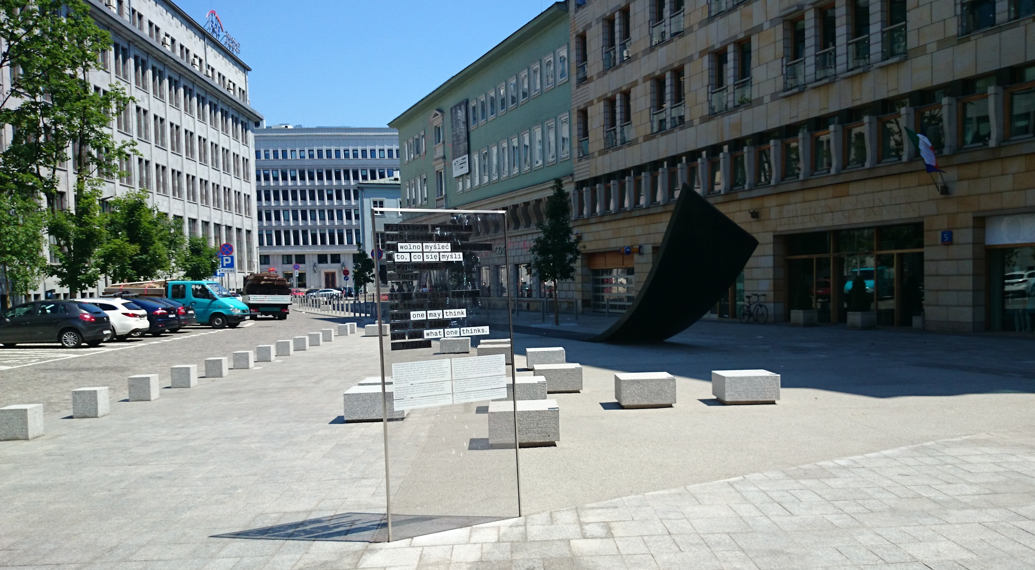 Memoriał Wolnego Słowa na Skwerze Wolnego Słowa w Warszawie – widok w kierunku wschodnim, w głębi widoczny budynek dawnej siedziby KC PZPR